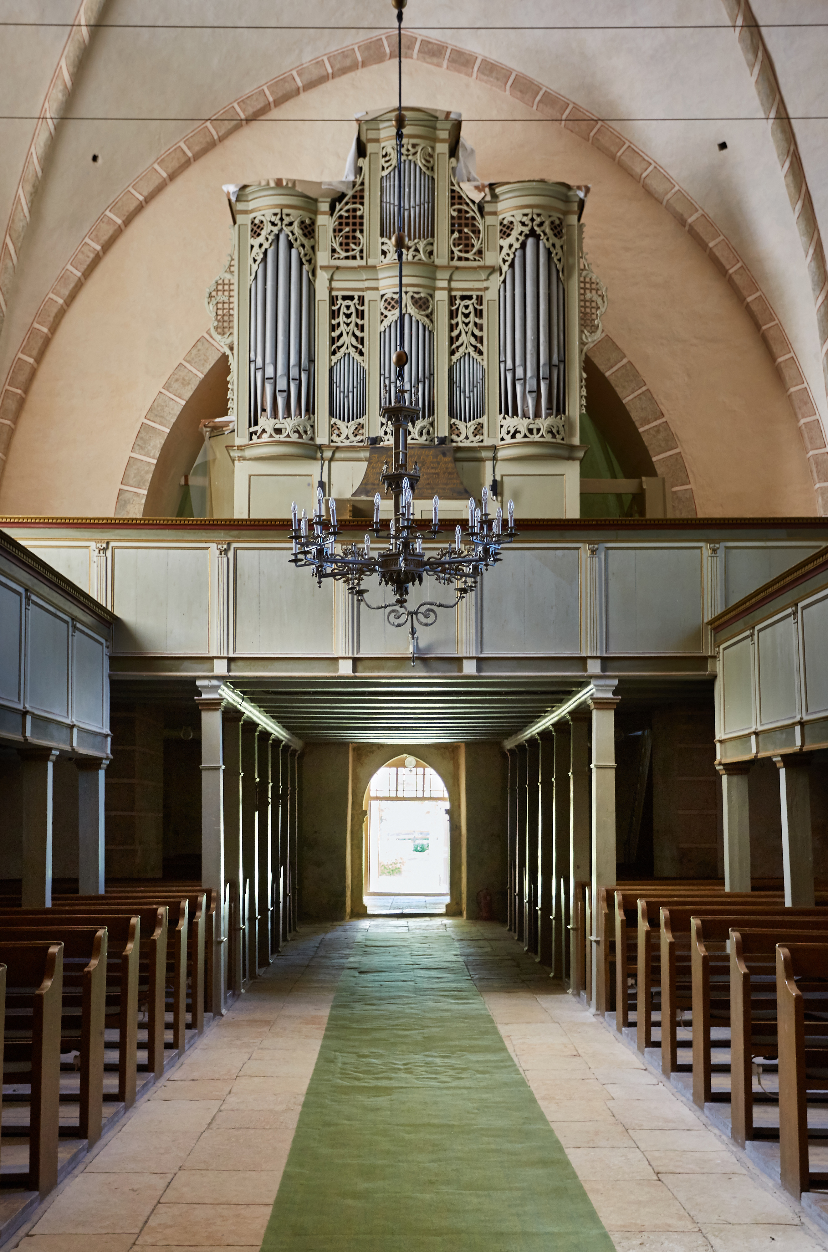 Kihelkonna kiriku sisevaade